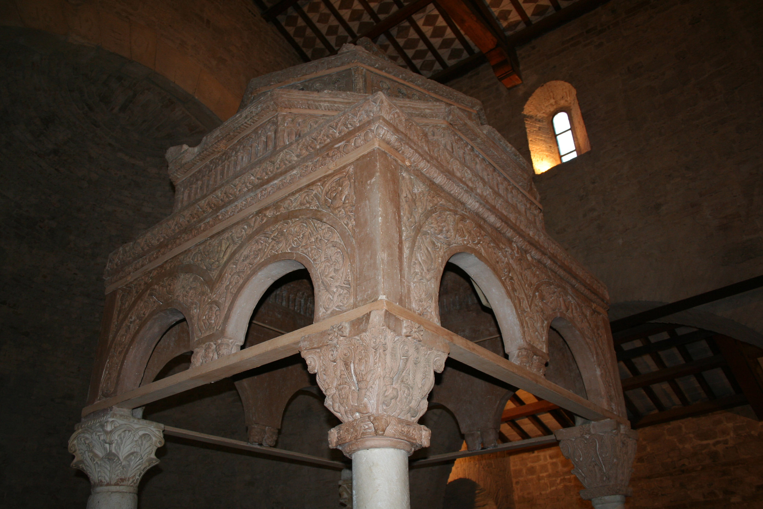 Chiesa di San Clemente al Vomano, particolare dei tamburi e dei capitelli del ciborio all’interno dell'edificio religioso appartenente al complesso abbaziale omonimo nel paese di Guardia Vomano in provincia di Teramo, Abruzzo, Italia.